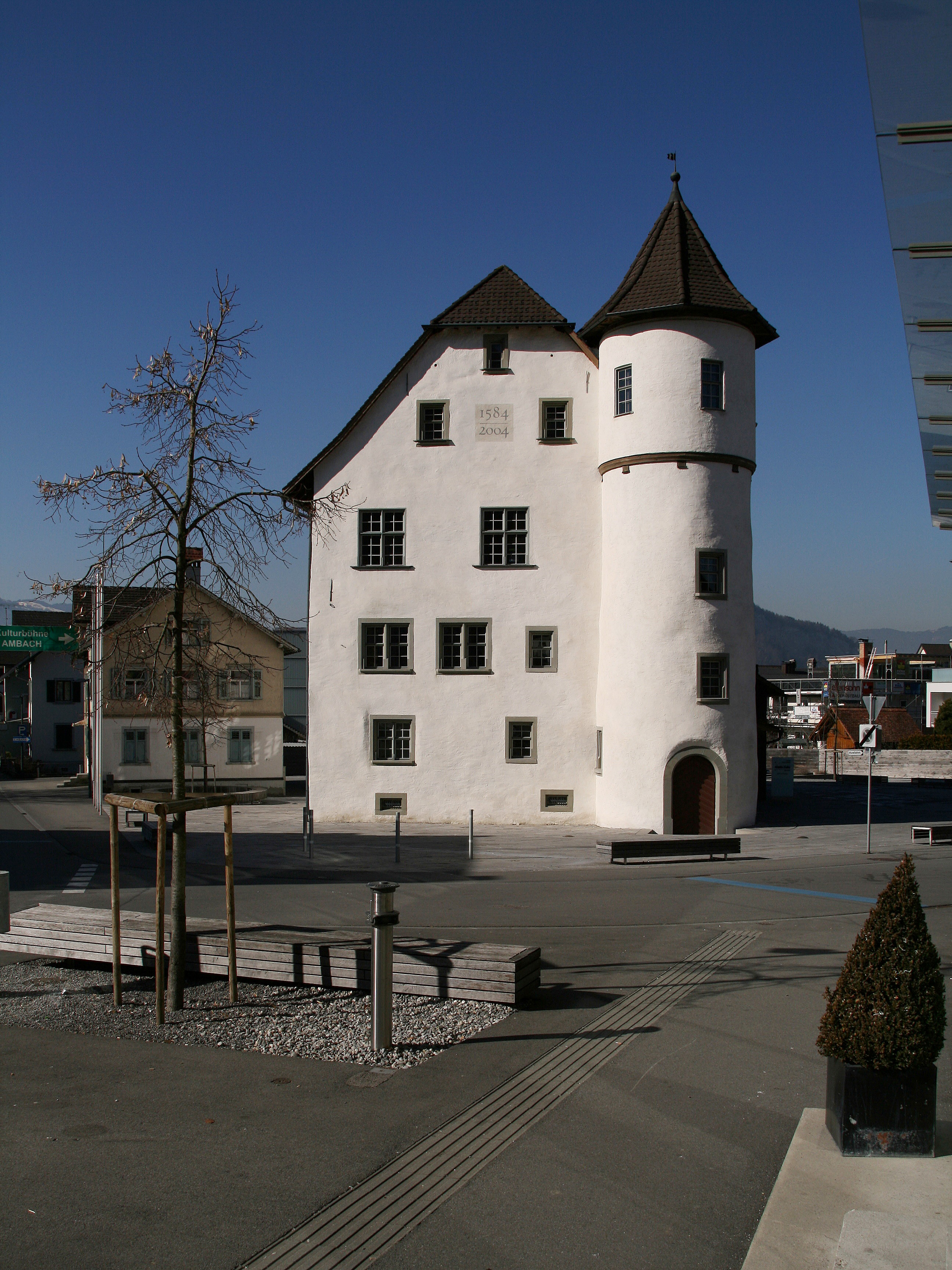 aus dem DEHIO Vorarlberg 1983: JONAS´SCHER ANSITZ (Jonas-Schlössle), südwestlich der Pfarrkirche. Erbaut 1584 durch Lienhart Jonas von Buch und Udelberg; im Besitz der Familie Jonas bis 1720, 1748 Verkauf an die Gemeinde Götzis. *** in Götzis, Vorarlberg.